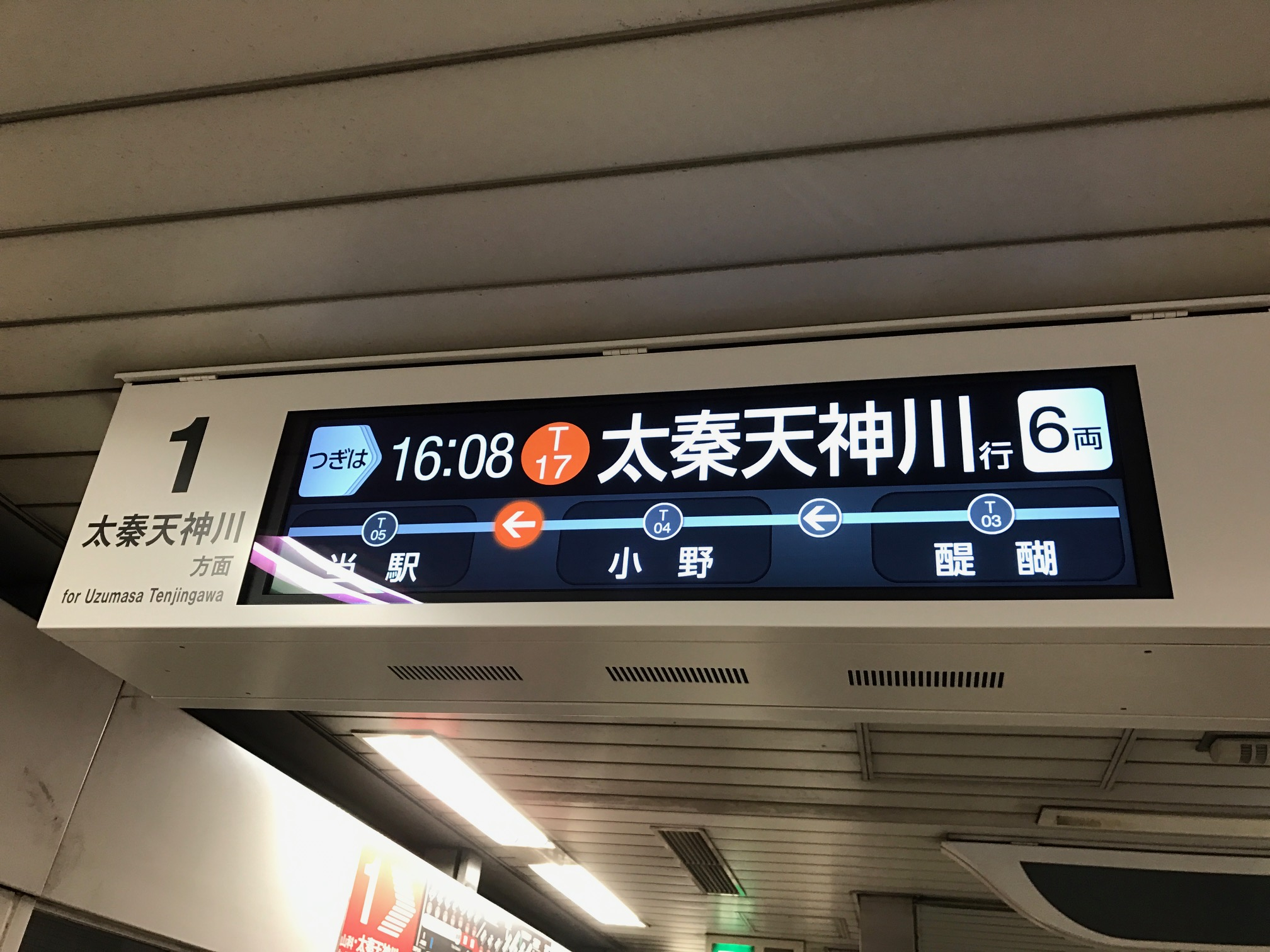 京都市交通局椥辻駅